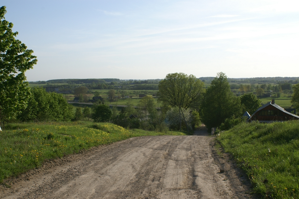 Вид с Вышгородецкой возвышенности, от церкви Бориса и Глеба в направлении Пыталова.